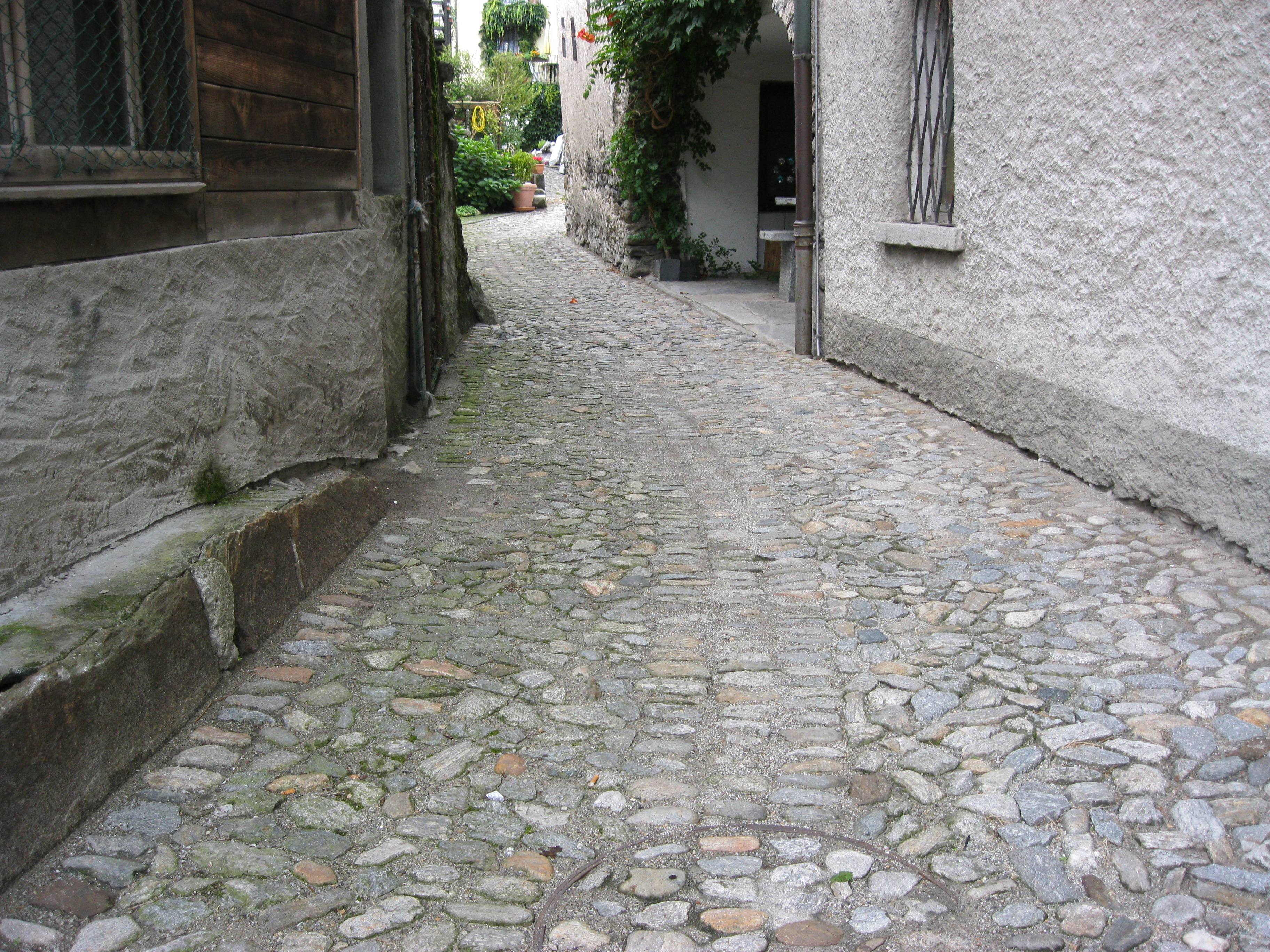 Il nucleo di Preonzo